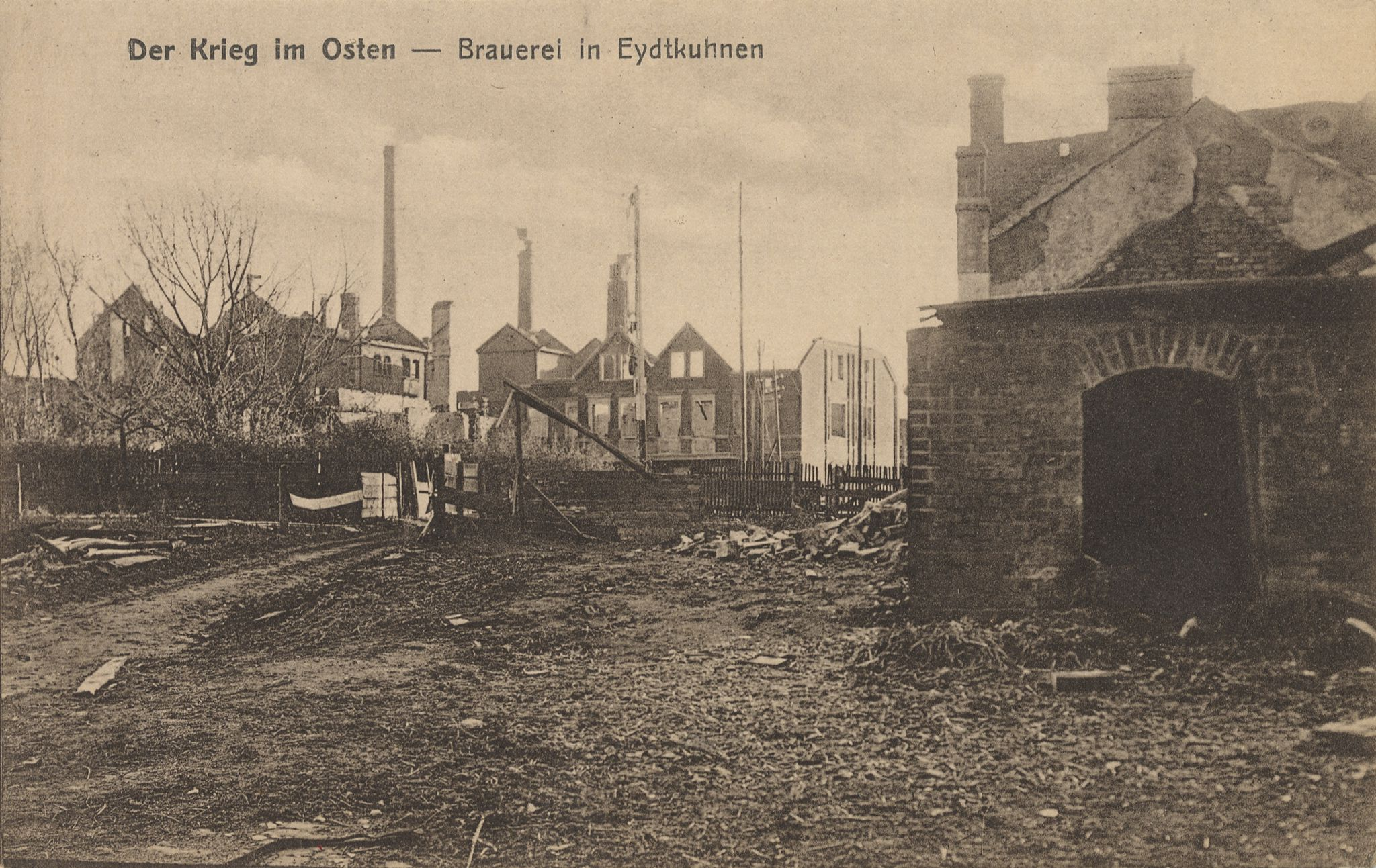 Tschernyschewskoje (russisch Чернышевское, wissenschaftliche Transliteration: Černyševskoje; deutsch Eydtkuhnen bzw. 1938–45 Eydtkau, litauisch Eitkūnai). Im Ersten Weltkrieg zerstörte Brauerei.